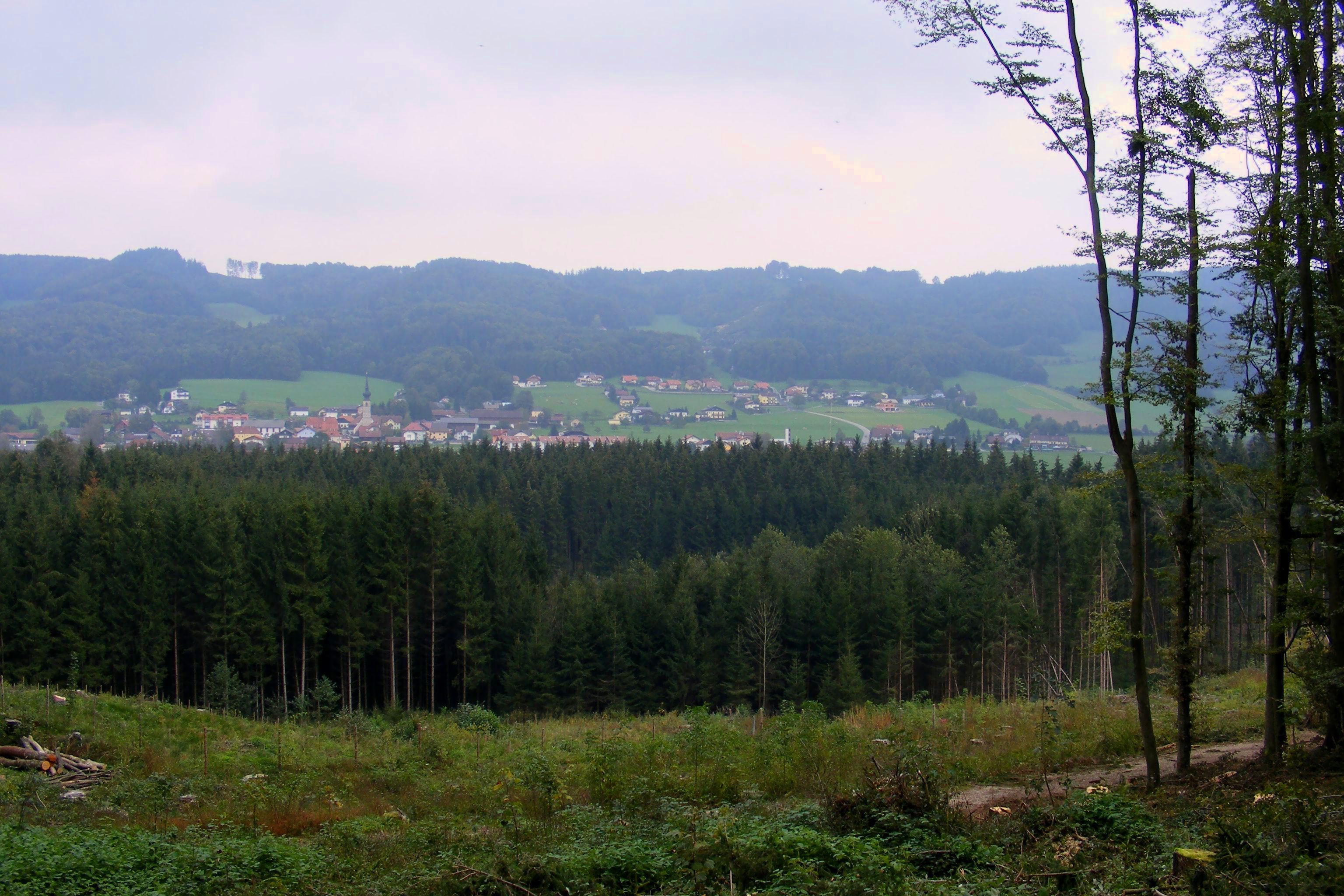 Blick über das Oichtental nach Nußdorf am Haunsberg